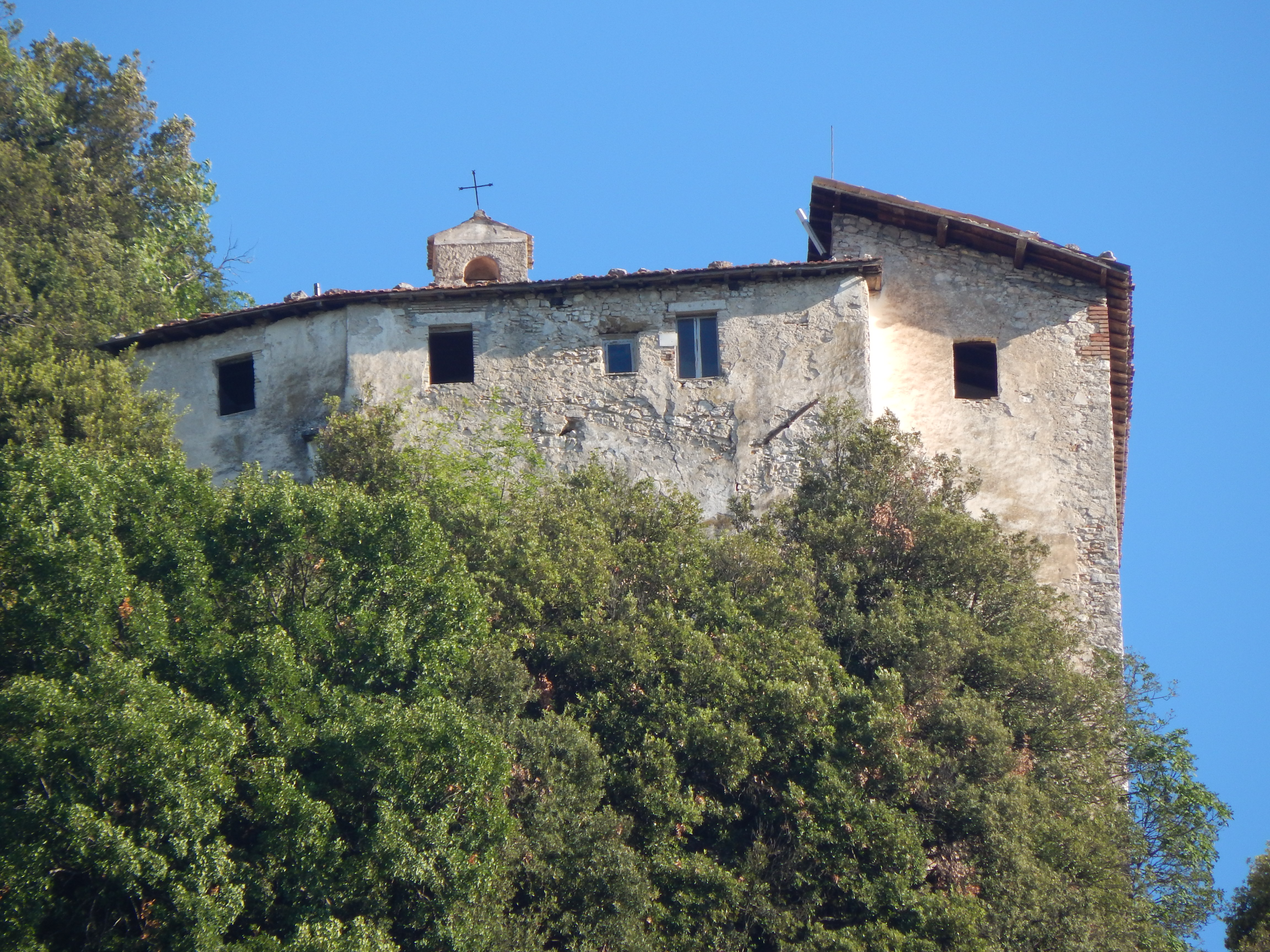 Chiesa di San Nicola - Scandriglia (provincia di Rieti, Lazio)